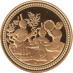 Bülbülün xatirəsinə həsr olunmuş qızıl sikkə